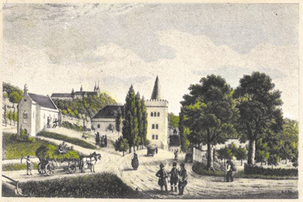 Roederhof in Huy, nach einem Stahlstich von 1830